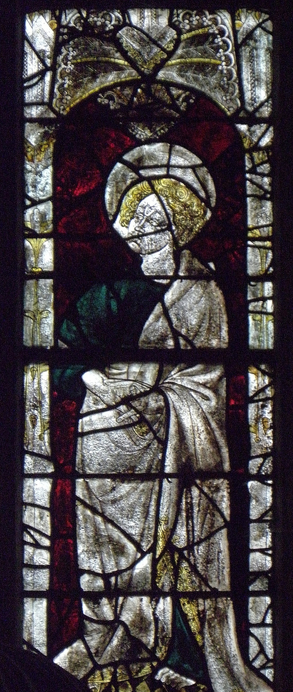 Saint-Jean. Maîtresse-vitre de l'église Notre-Dame de Runan (22).